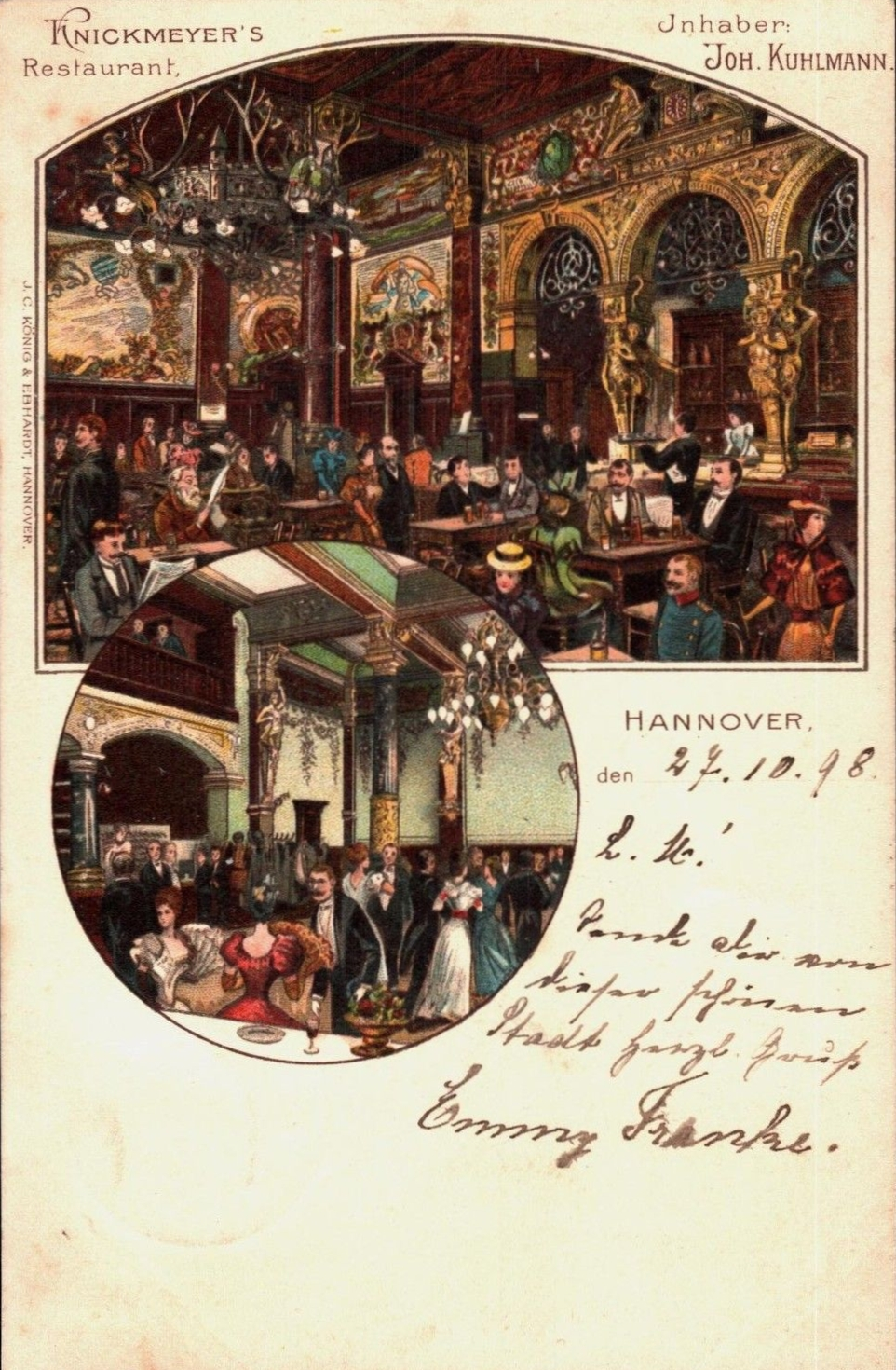 Knickmeyer's Restaurant in Hannover, Inhaber Joh. Kuhlmann. Postkarte von König & Ebhardt, Hannover, verschickt am 27. Oktober 1898. Farbige Lithographie